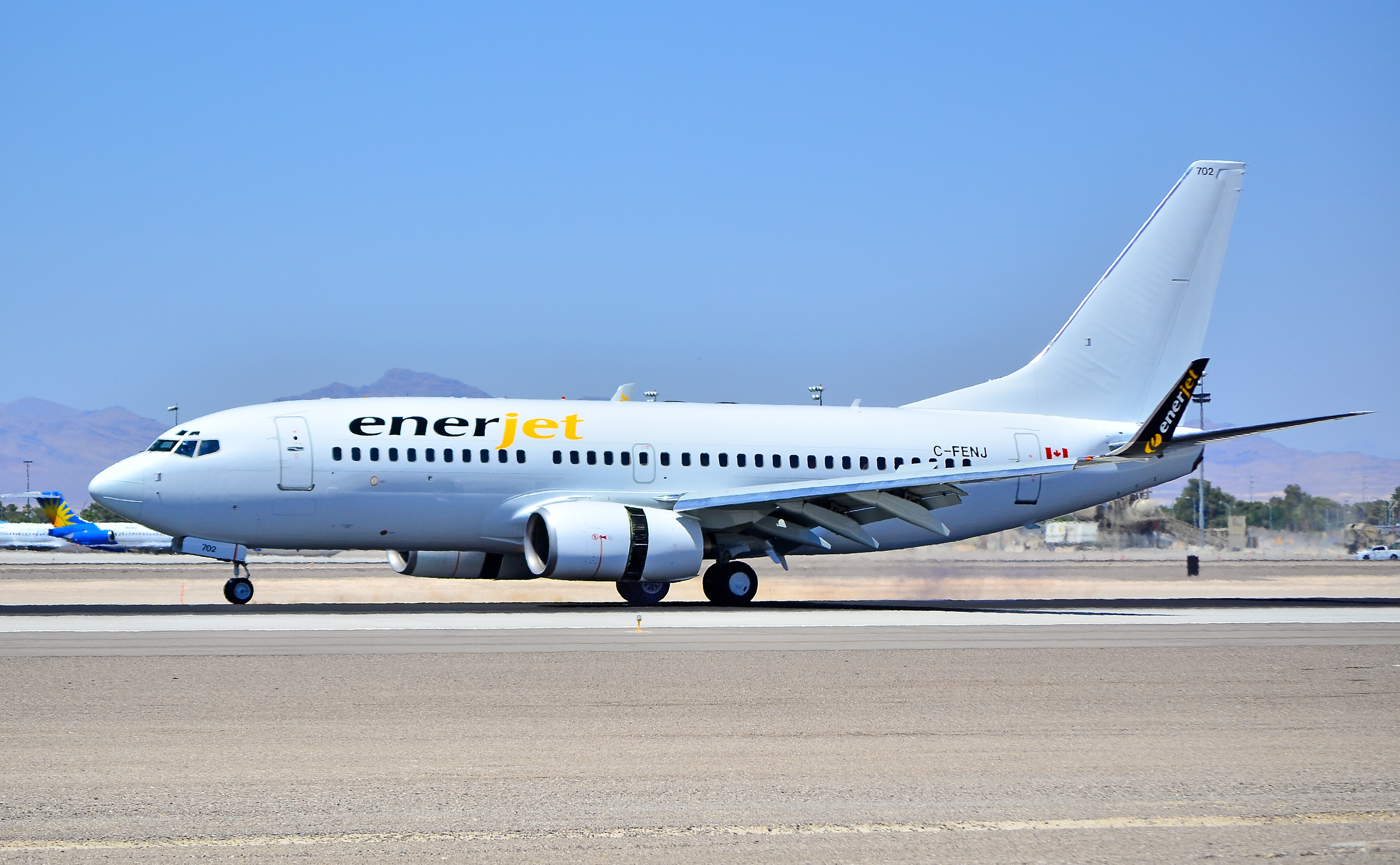 Las Vegas - McCarran International (LAS / KLAS) USA - Nevada, May 31, 2012 Photo: Tomás Del Coro